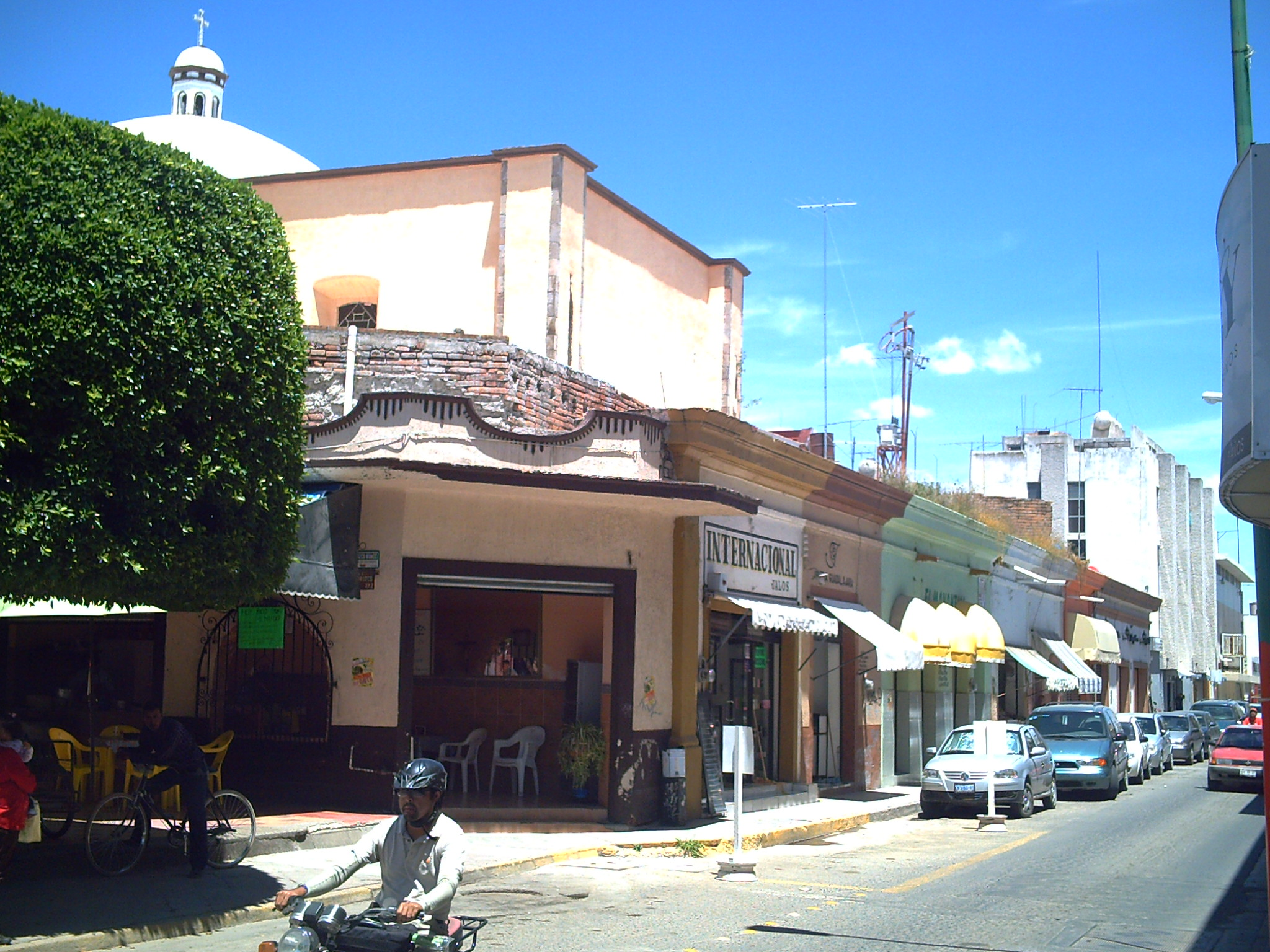 Calle Presibetero Márquez en la Zona Centro de San Francisco del Rincón